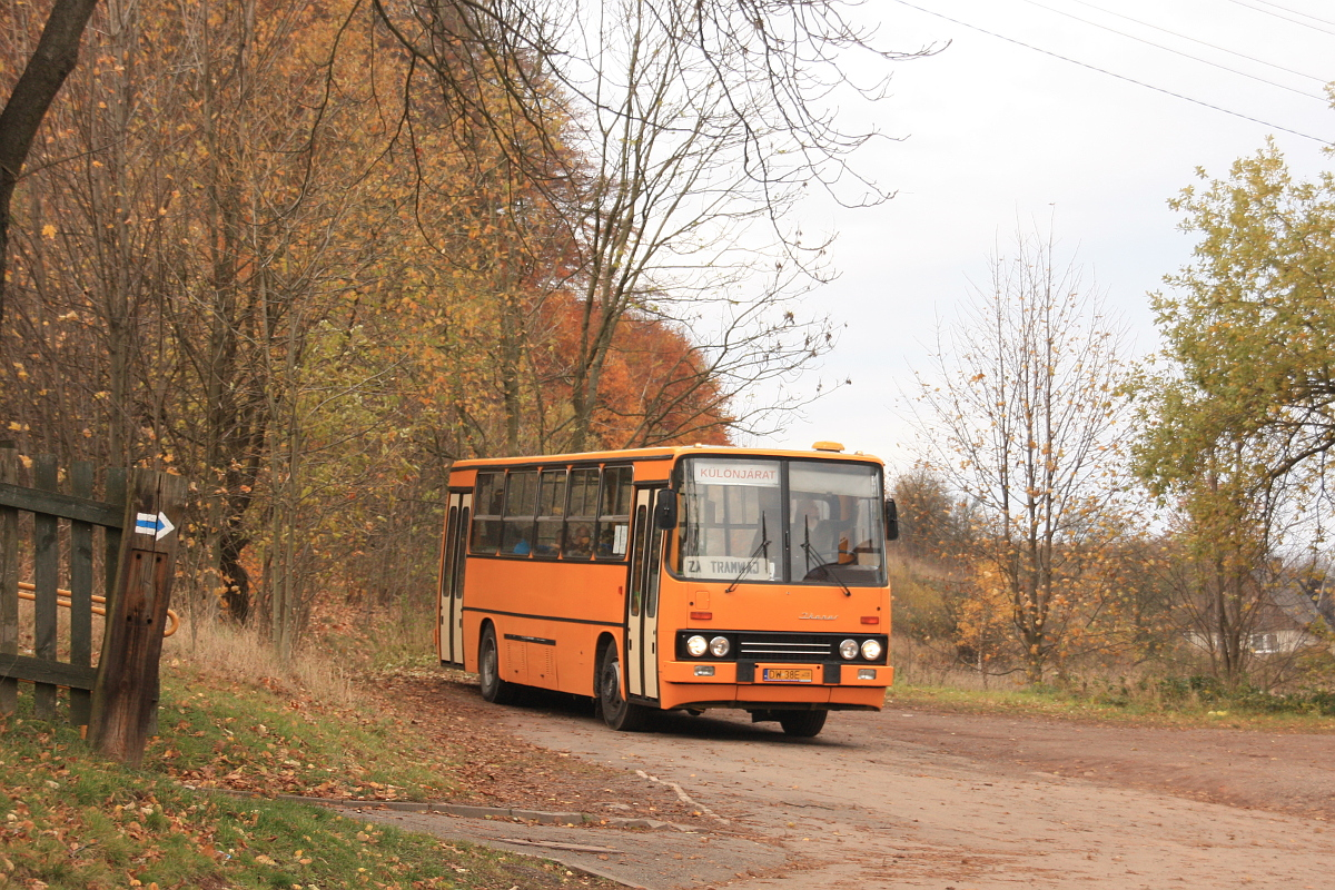 Ikarus 260.32 w Wałbrzychu